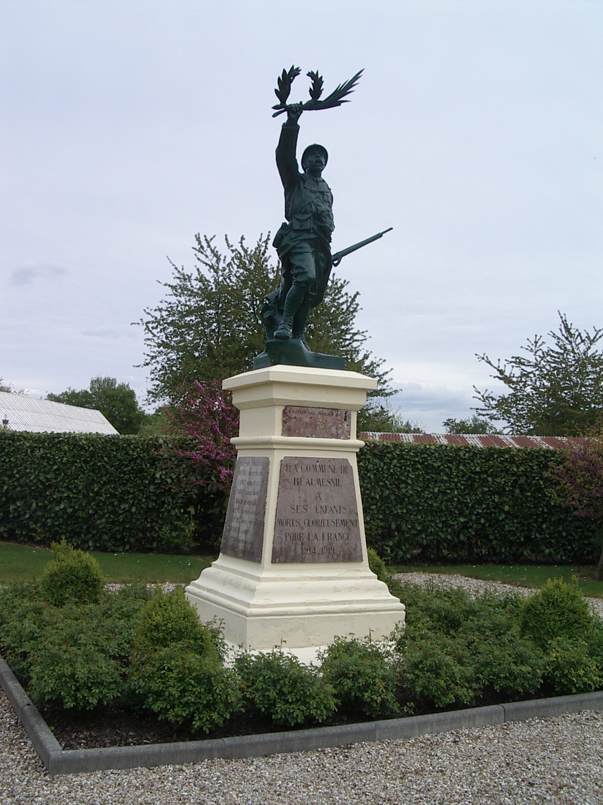 Monument aux morts de Beaumesnil (Eure) (1920), sculpteur Eugène-Paul Benet